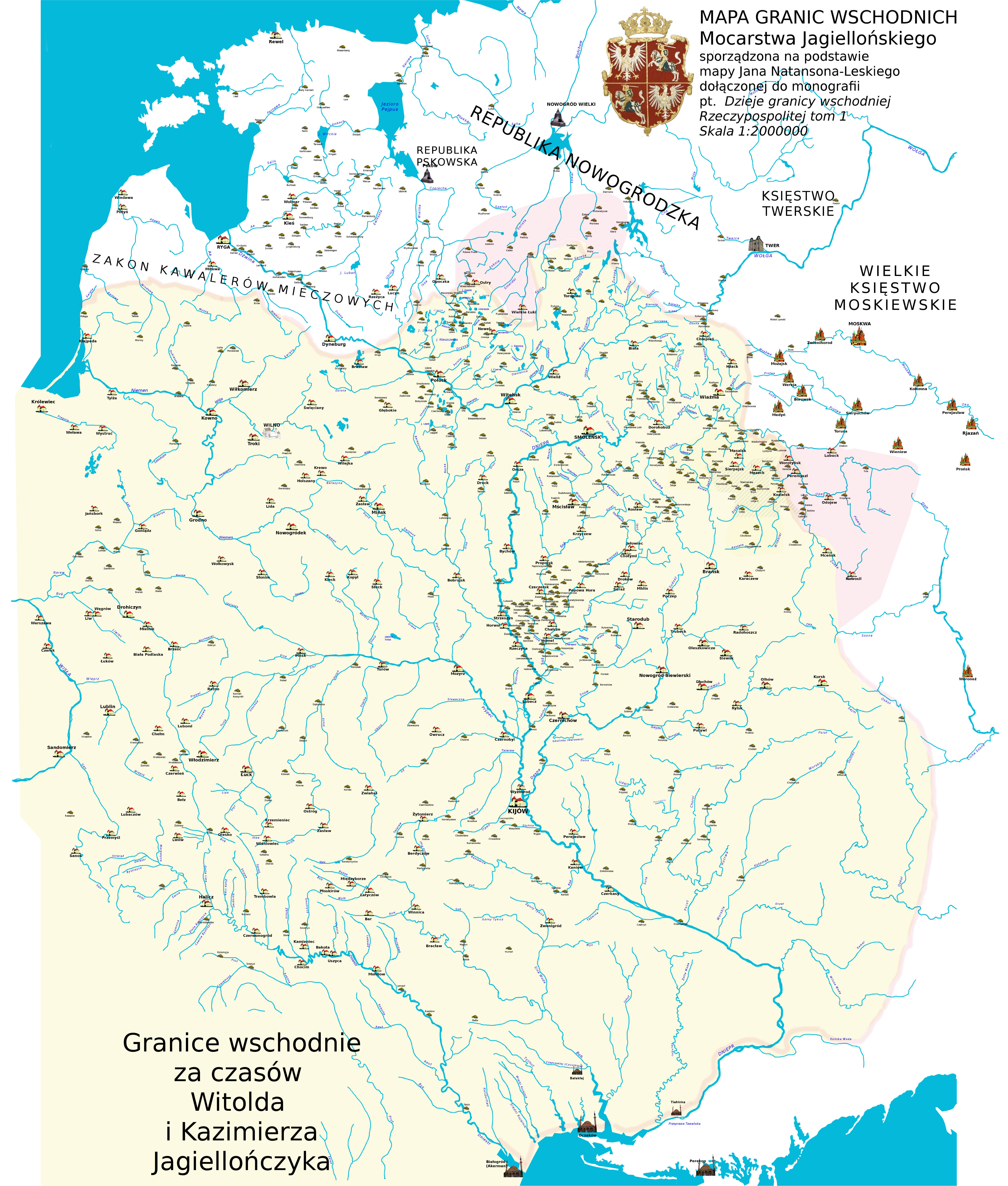 Wschodnie ziemie unii polsko-litewskiej w XV wieku, rzeki, miasta, zamki i mniejsze miejscowości (Wielkie Księstwo Litewskie i Ruś Czerwona), wschodnie pogranicze Rzeczypospolitej